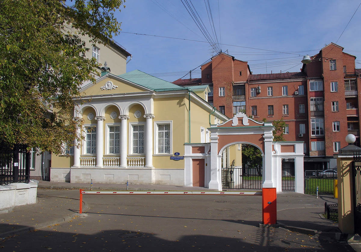 6, Spasopeskovsky Lane, Moscow